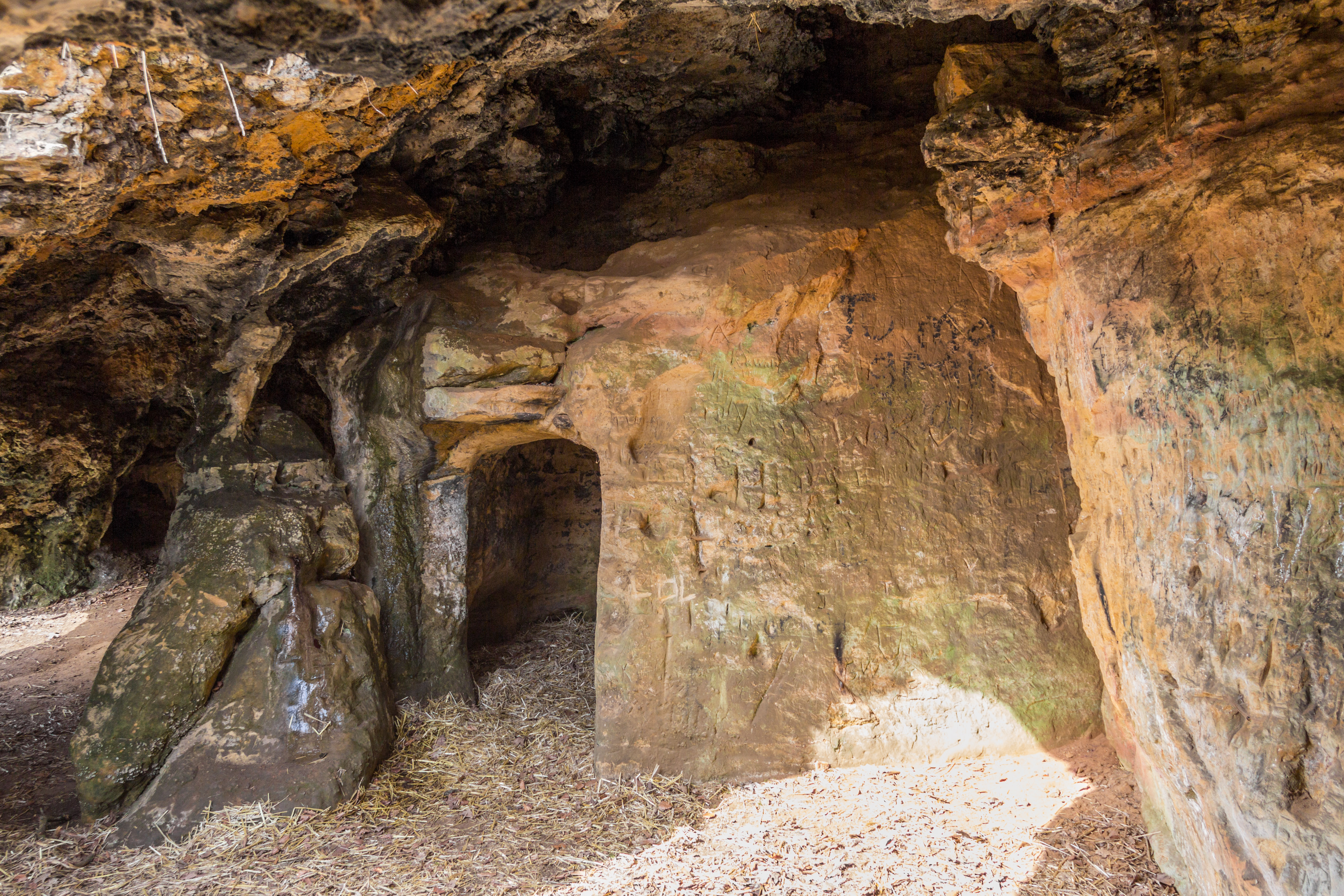 Krügerloch, Höhle, K 16, Doggersandstein, Geotop, Naturdenkmal, Plankstetten